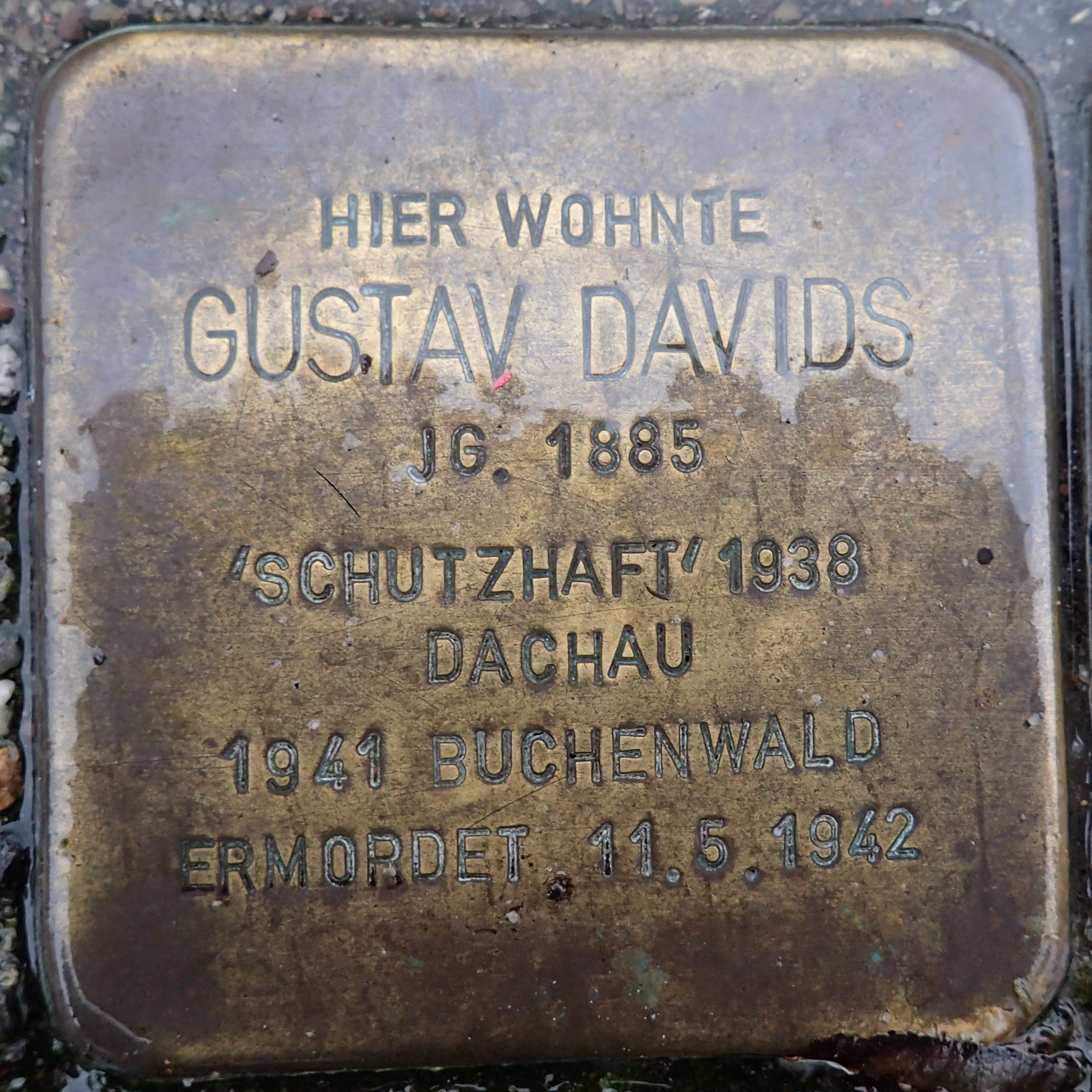 Stolperstein Geldern Brühlscher Weg 23 Gustav Davids